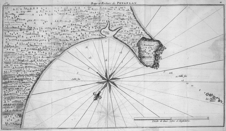 [Illustrations de Voyage autour du monde] Auteur : George Anson Éditeur : Henri-Albert Gosse et Compagnie (Genève) 1750